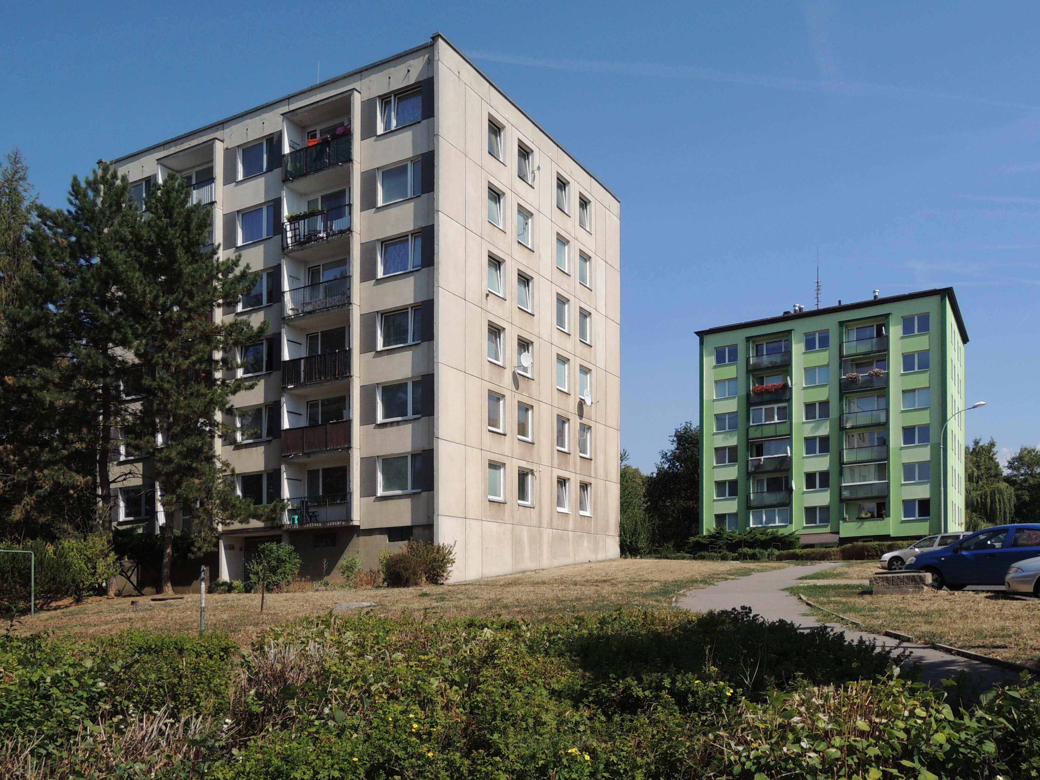 Částečně původní bodový dům s zrekonstruovaným vedlejším v ulici Jana Zajíce